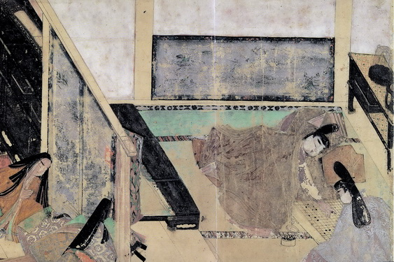 平安時代(12世紀前半)の『源氏物語絵巻』「宿木」段、清涼殿・朝餉の間の副障子